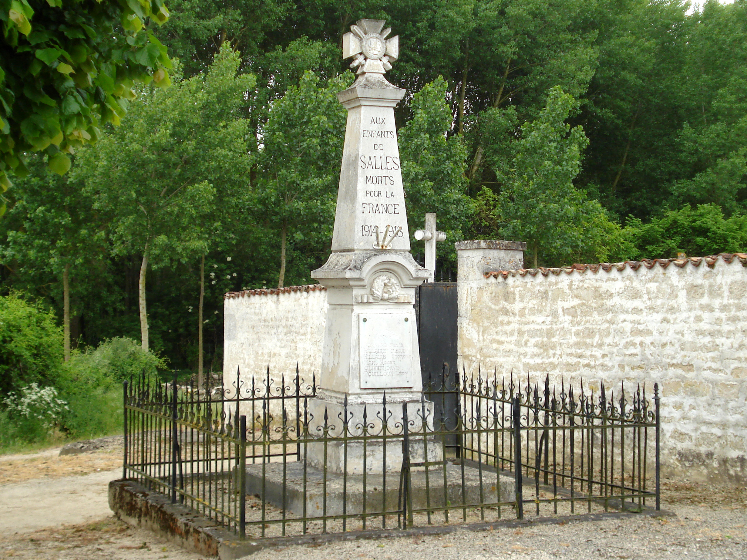 Le monument aux morts de l'ancienne commune de Salles-lès-Aulnay